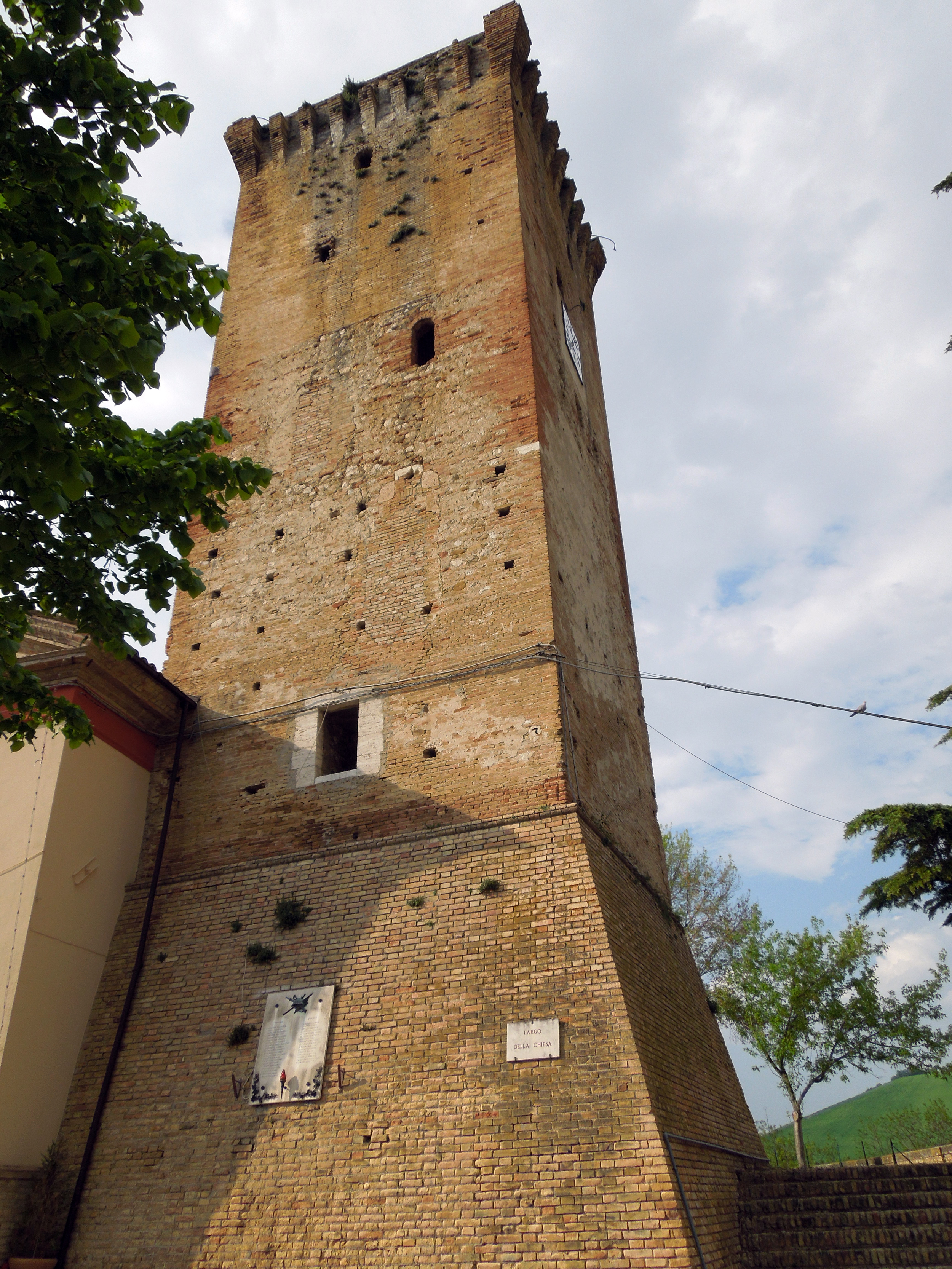 Torre a base quadrangolare in pietra e laterizi del paese di Ripattoni in provincia di Teramo.